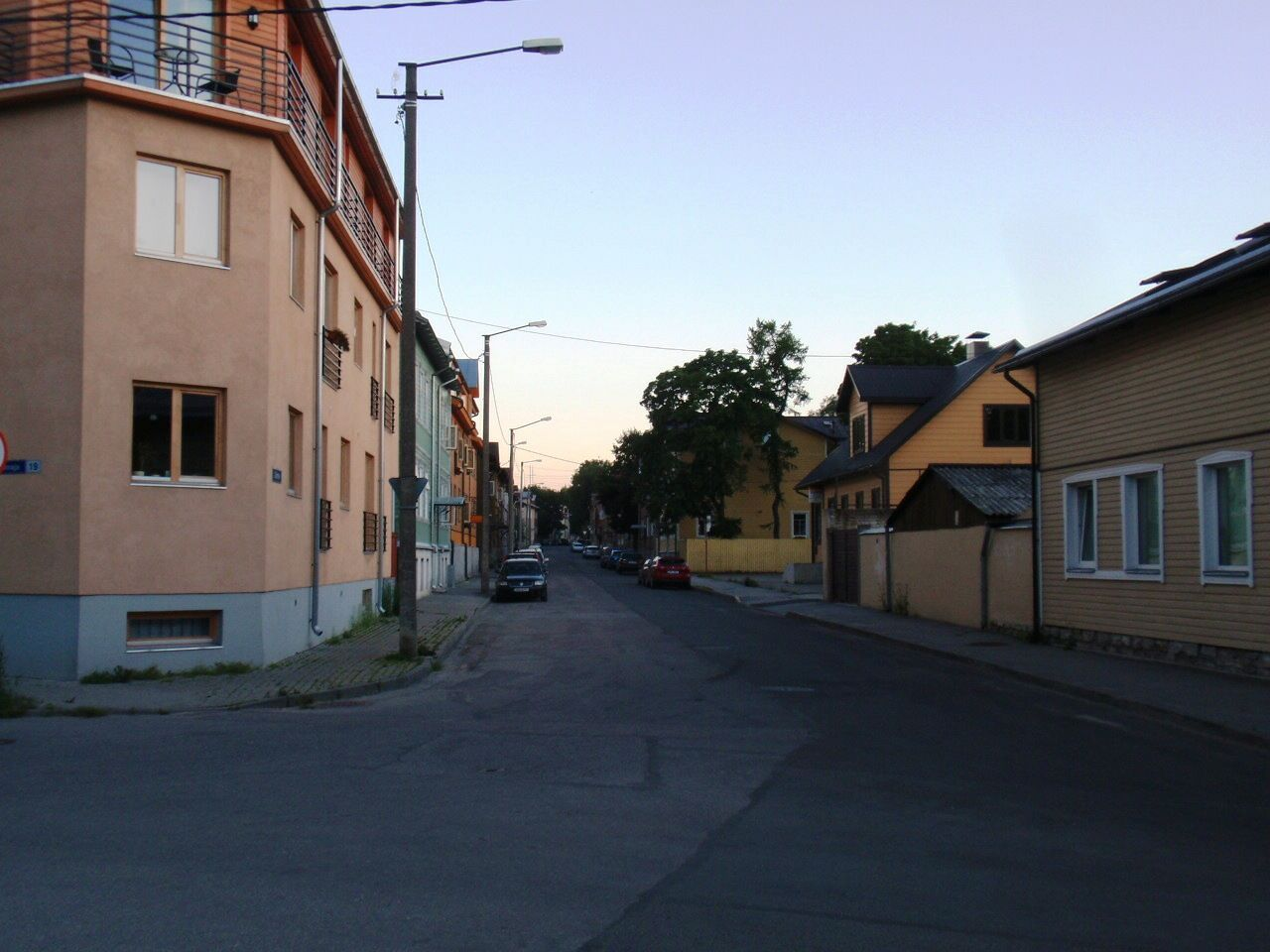 Salme tänav Tallinnas Uus-Kalamaja tänava poolt.